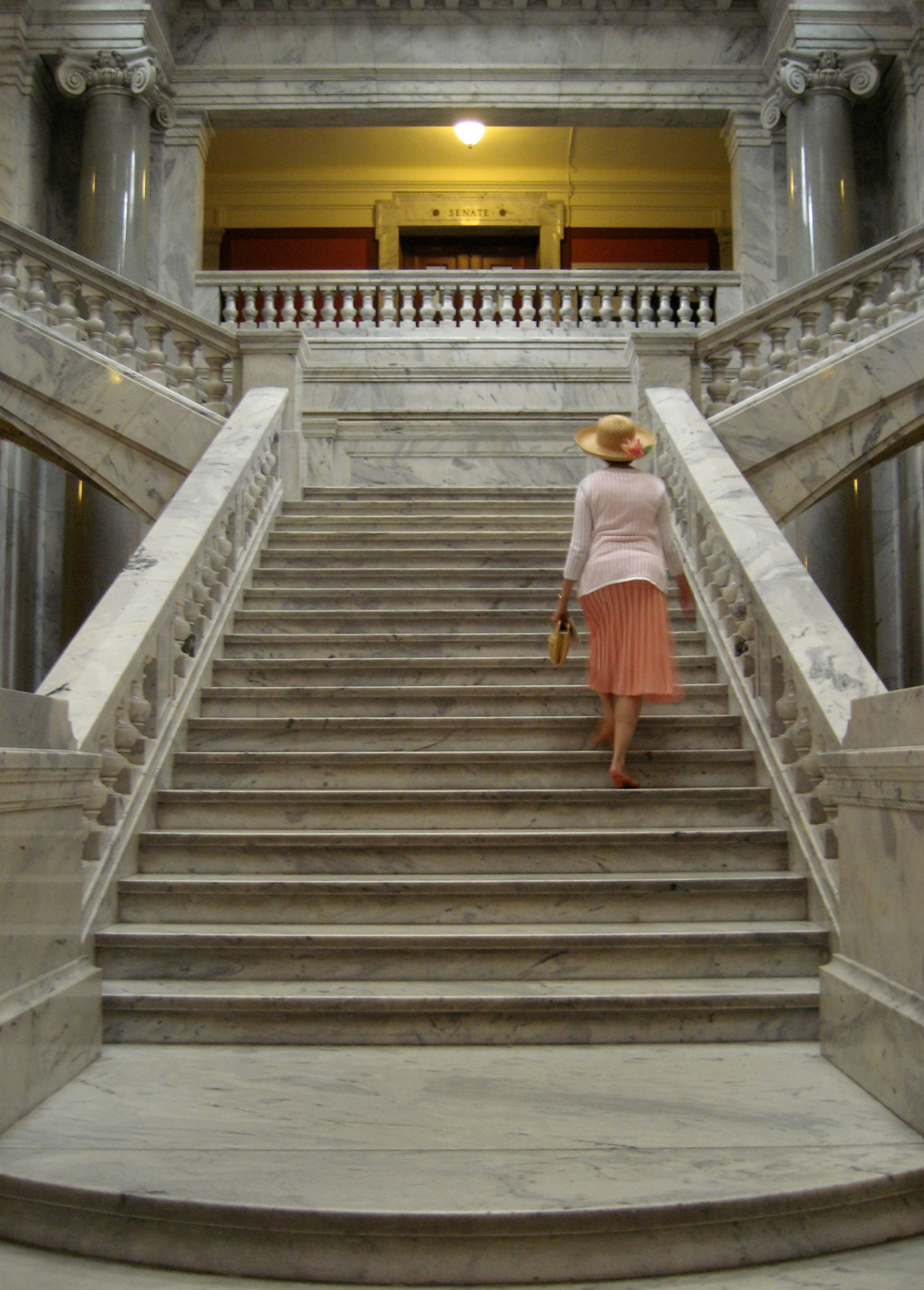 Kentucky state capitol marble staircase